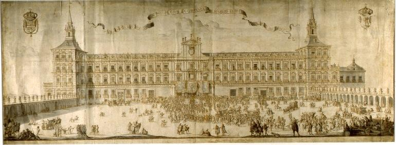 Proclamación de Felipe V en Madrid,dibujo a tinta, 47,30 x 135 cm. Inscripción: "ACLAMACION DEL REY NUESTRO SEÑOR DON PHELIPE VPOR LA CORONADA VILLA DE MADRID ELDIA XXIV DE NOVIEMBRE DEL MDCC.// Filippo Palotta Architetto de S.M. ta Catt. a fece". Museo de Historia de Madrid.